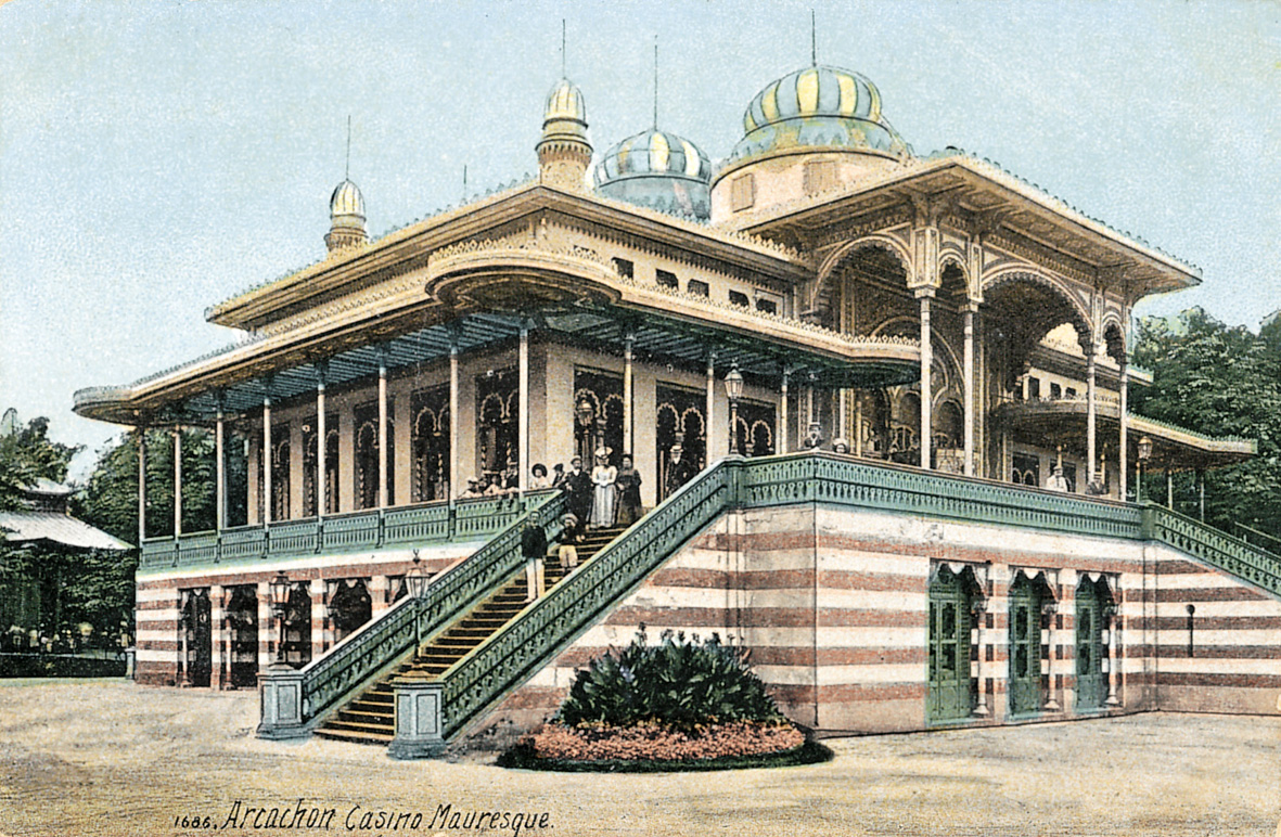 Vue du casino mauresque, arcachon, France, début XXe siècle